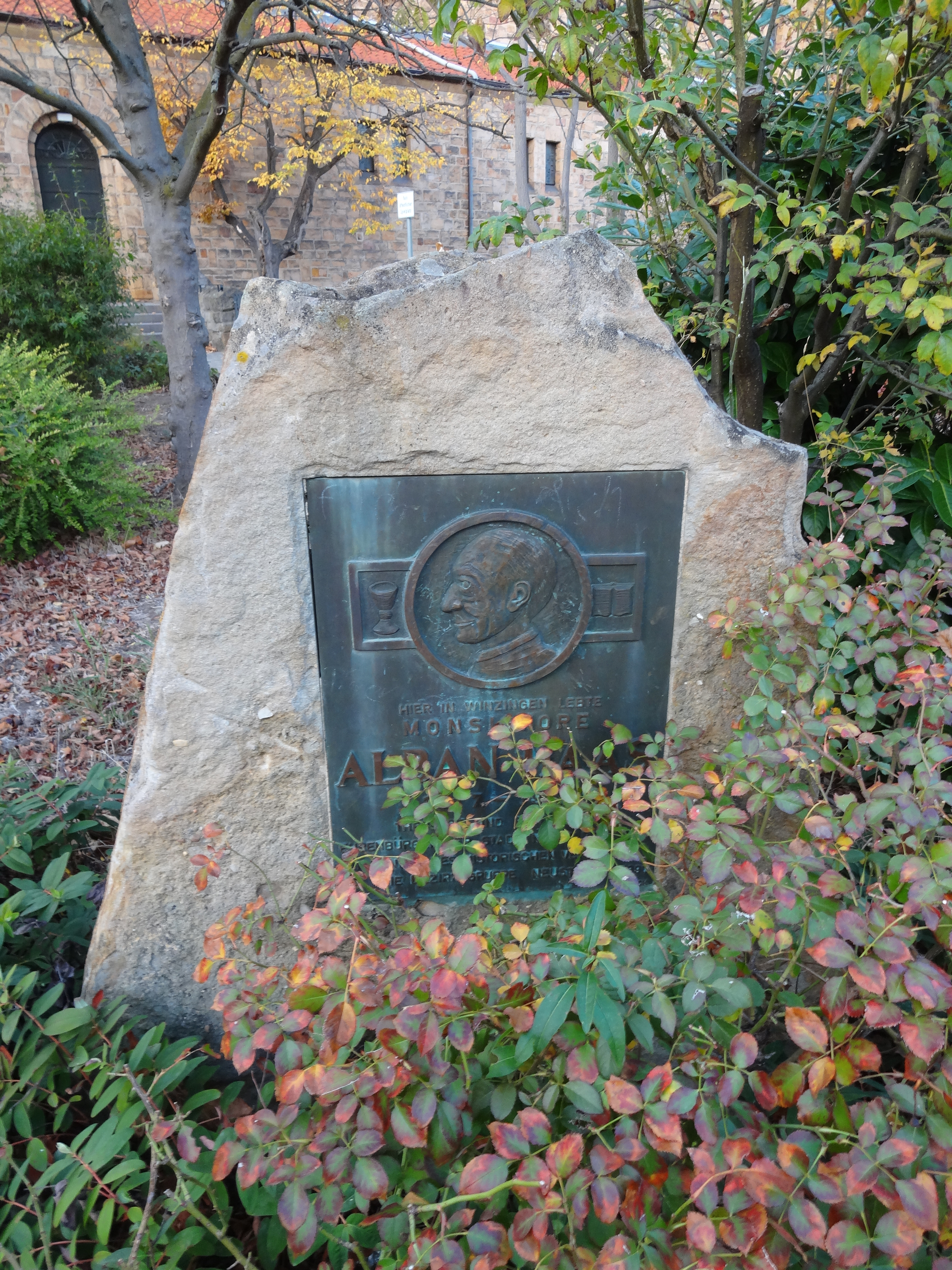 Alban-Haas-Gedenkstein in Neustadt an der Weinstraße; der Stein befindet sich vor der Kirche Ecke Hindenburgstraße/Branchweilerhofstraße